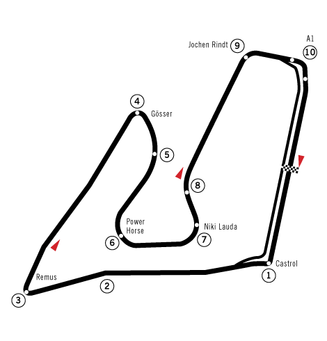 F1 circuit A1 Ring